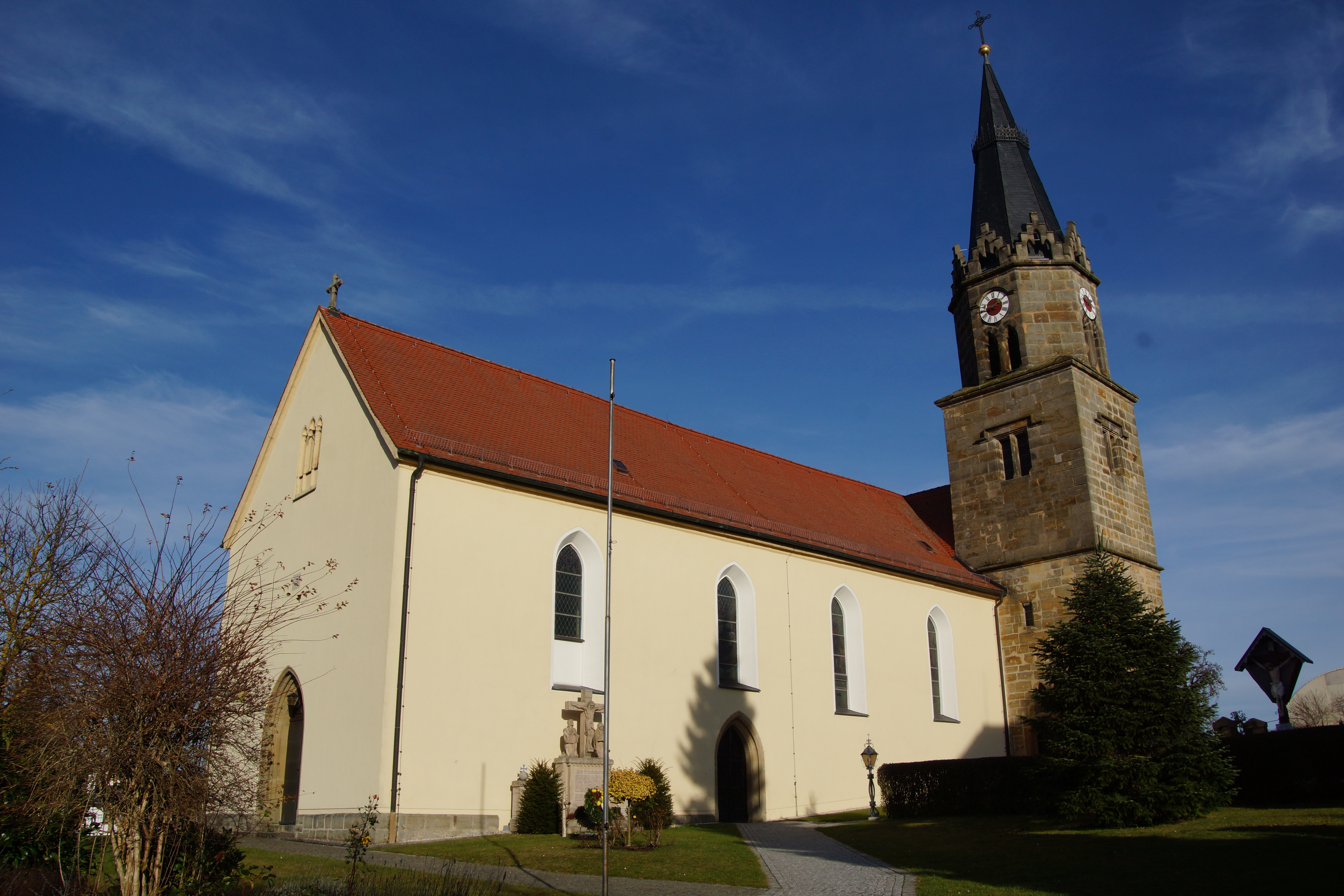 Die katholisch Pfarrkirche im Oberpfälzer Pittersberg